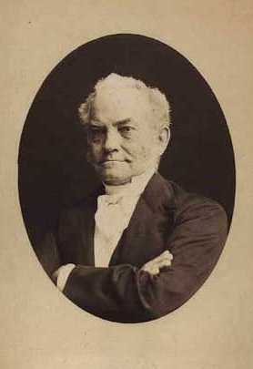 Hans Schneekloth (19.jun.1812-11.dec.1882), skolemand i København.